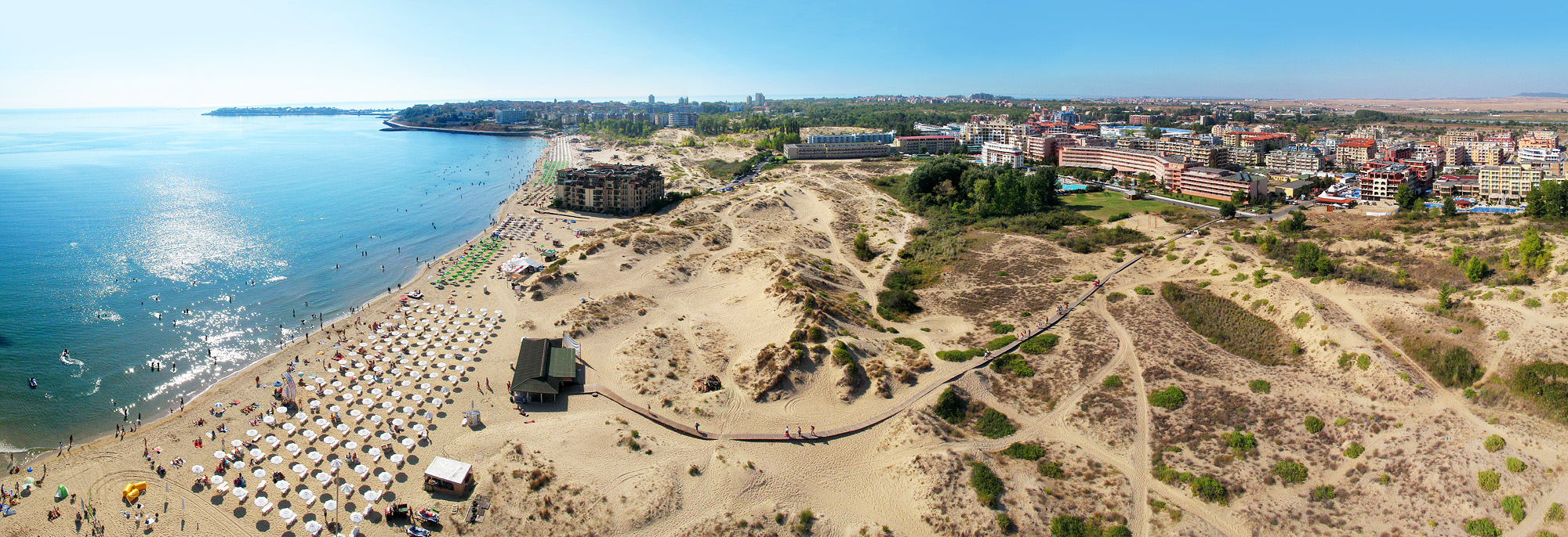 The beach and sand dunes of Sunny Beach resort, Bulgaria. Shot to show the location of a future hotel and advertise the closeness to the beach. Плажът и дюните на на Слънчев бряг. Целта на снимката беше да се покаже къде се намира терена на бъдещ хотел спрямо плажа (много близко до него).